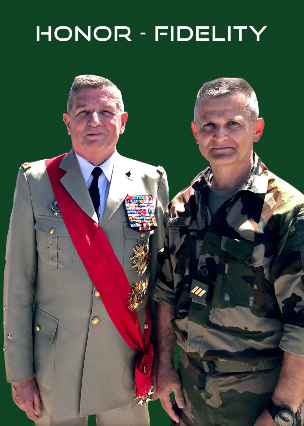 Se svým bývalým velitelem generálem Benoit Puga po 20 letech v Calvi Camerone 2018